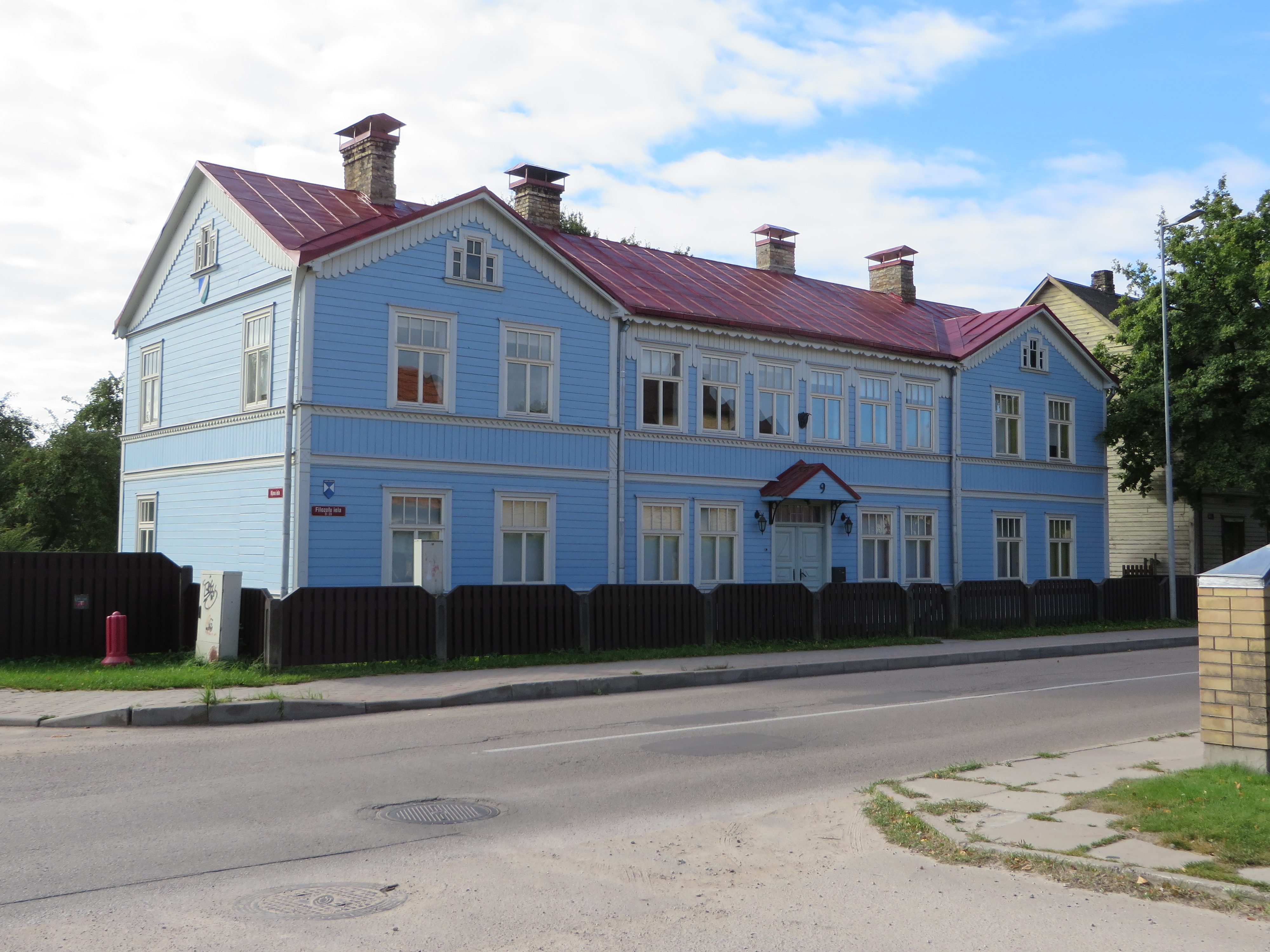 Dzīvojamā ēka, Jelgava, Filozofu iela 9